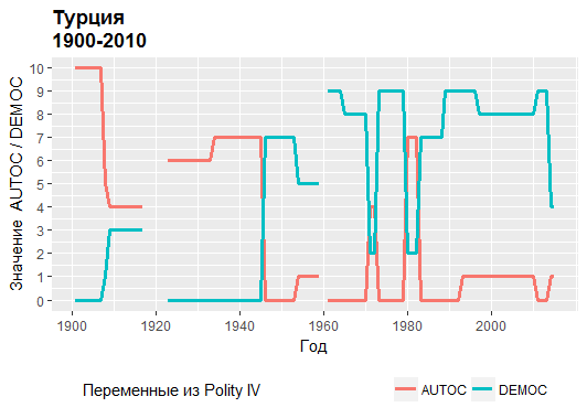 Трансформация политического режима в Турции по данным из базы данных Polity IV.